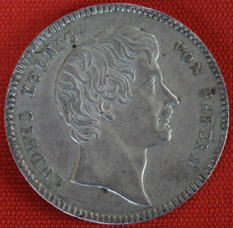 Kronentaler aus 1828 mit Konterfei Ludwig I.